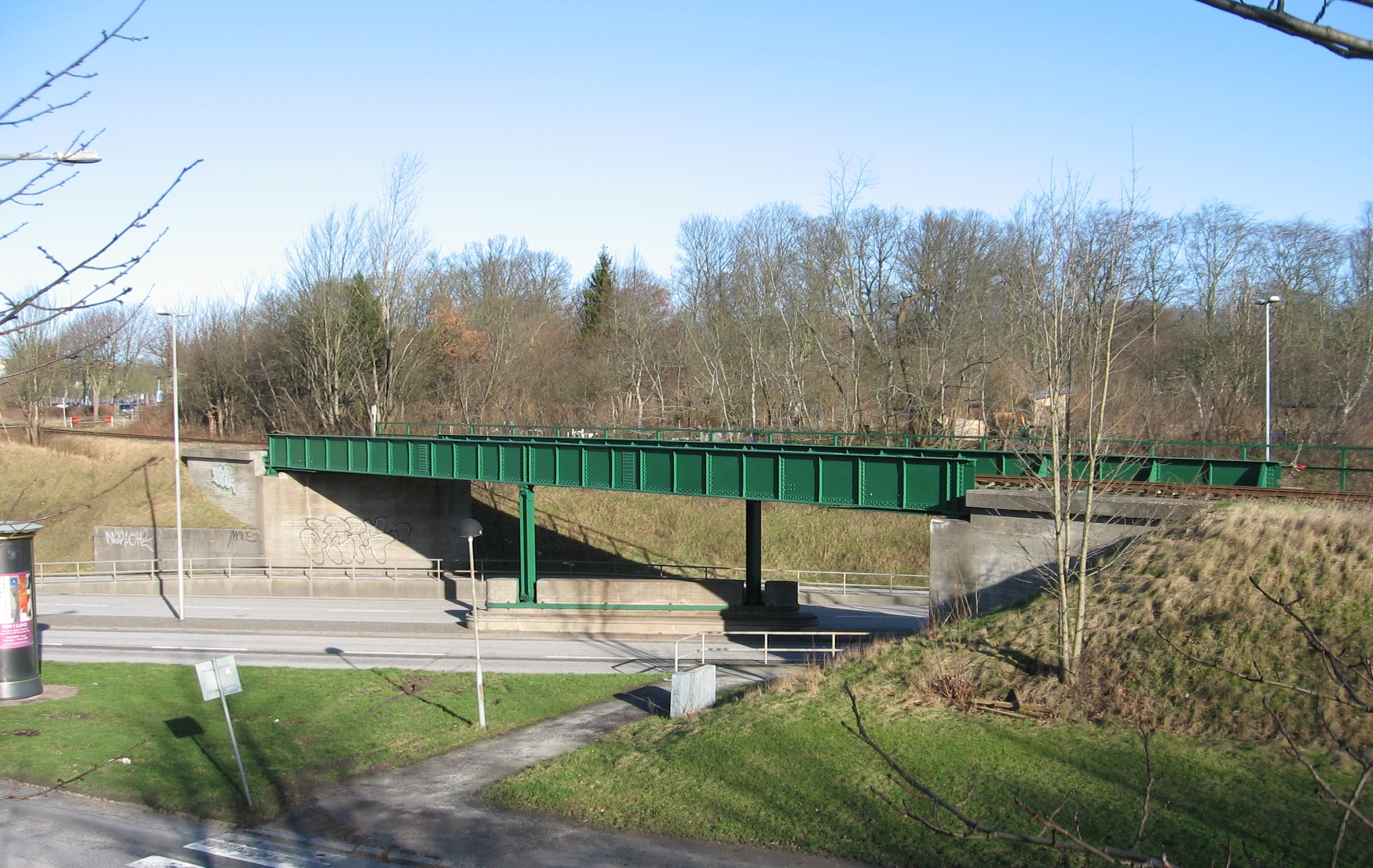 Järnvägsbro i Lund. En nitad stålbalkbro uppförd 1936 för Lund-Trelleborgs järnvägs räkning som går över Ringvägen, mellan Stadsparken och Klostergården.